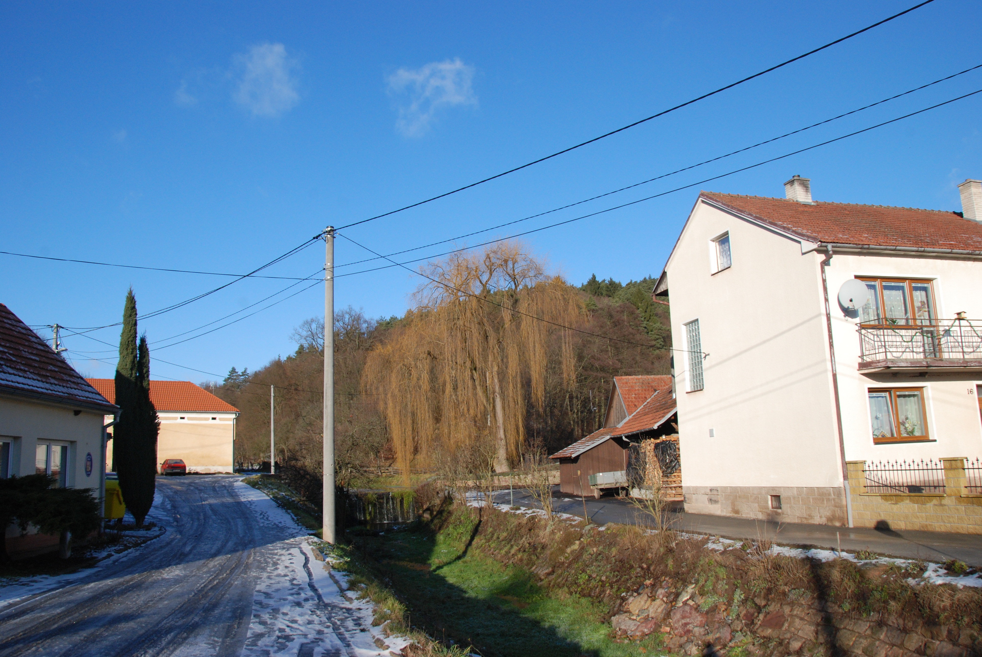 Lubě - koryto potoka Lubě